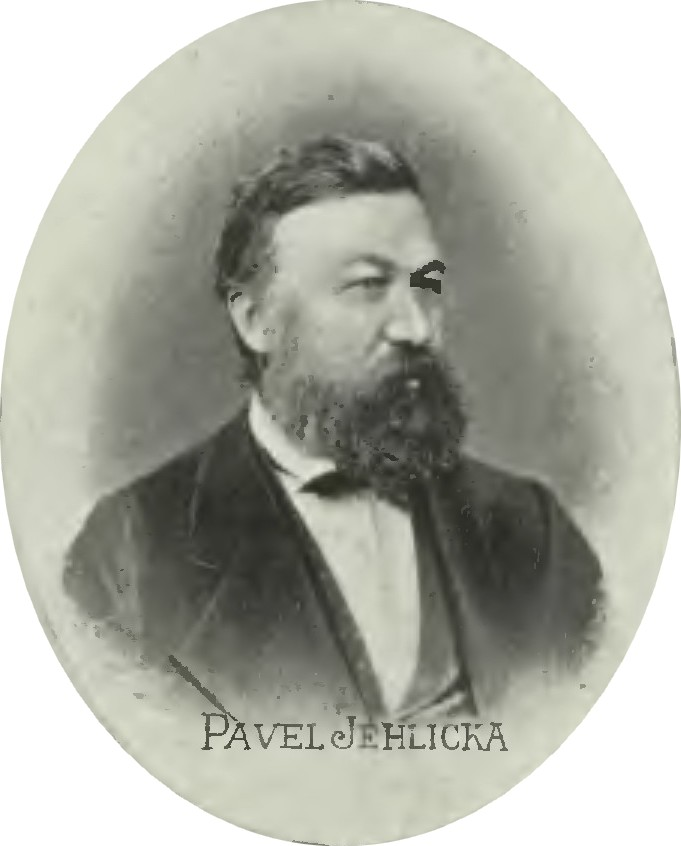 Portrét – Pavel Jehlička (1826 - 1883), Český středoškolský profesor.